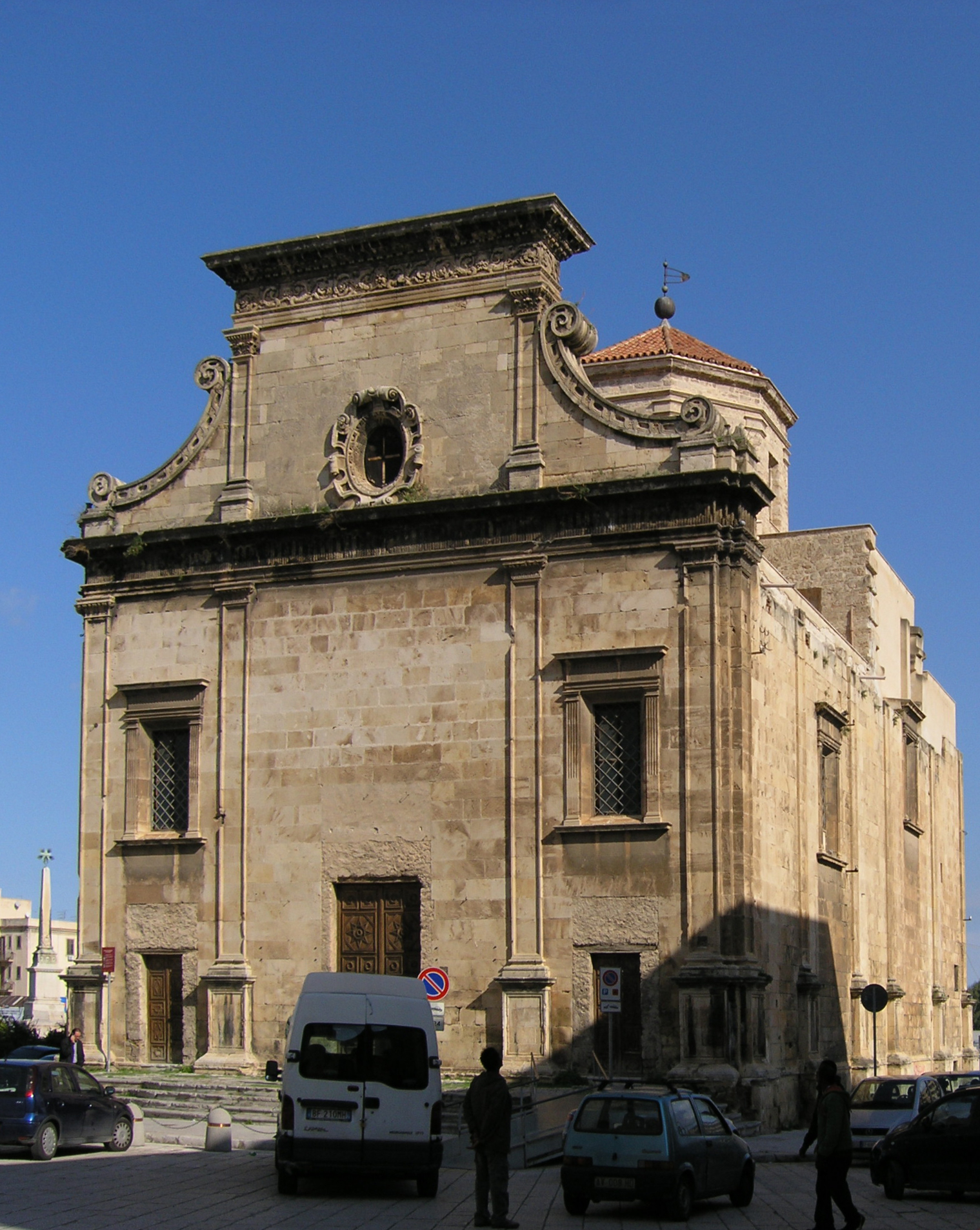 Giorgio Di Faccio (Niella Tanaro ? - Palermo, 1592), la Chiesa di san Giorgio dei Genovesi a Palermo.